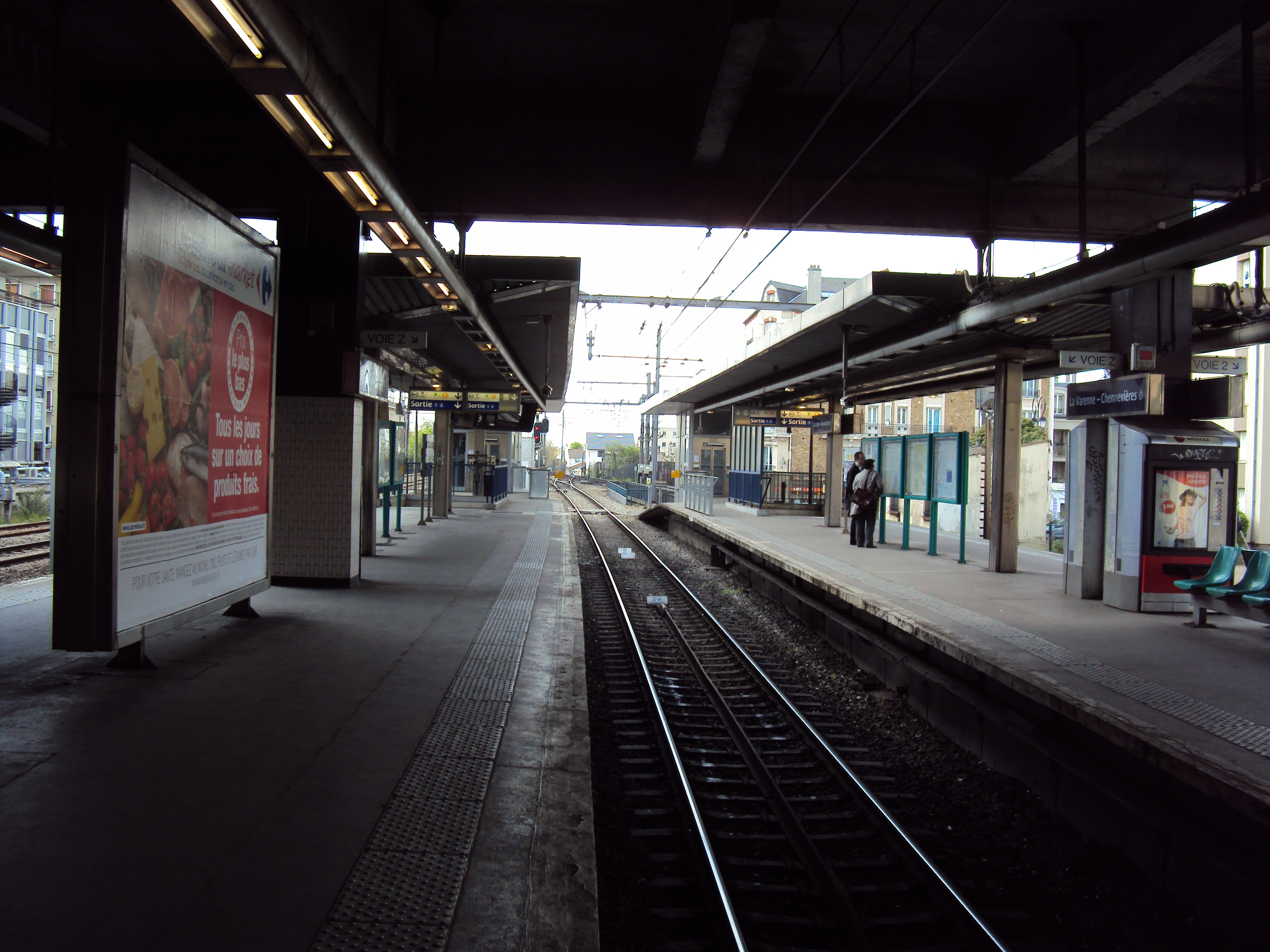 La voie centrale de la gare de a Varenne Chennevières